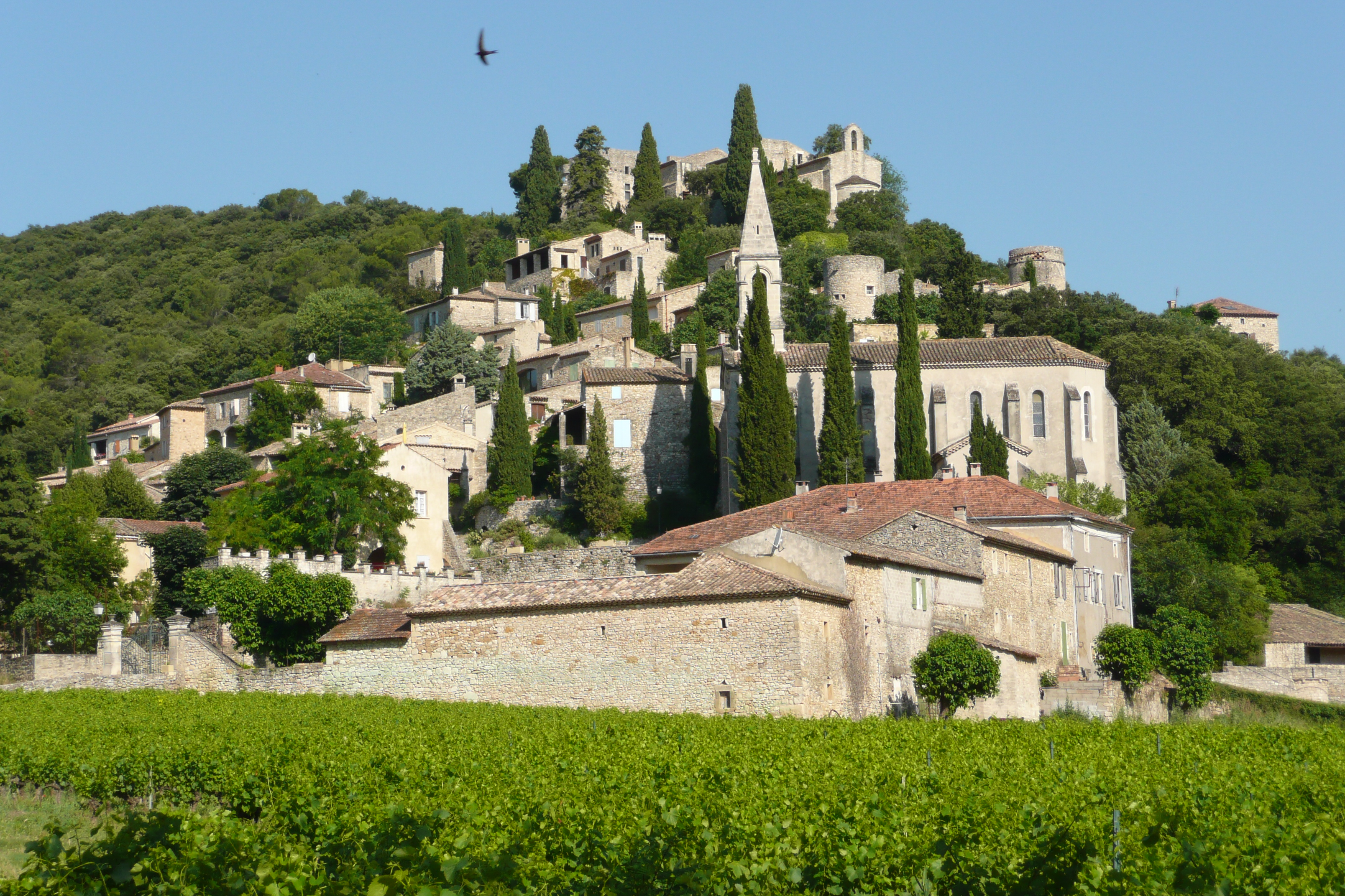 Vue d'ensemble La Roque-sur-Cèze.